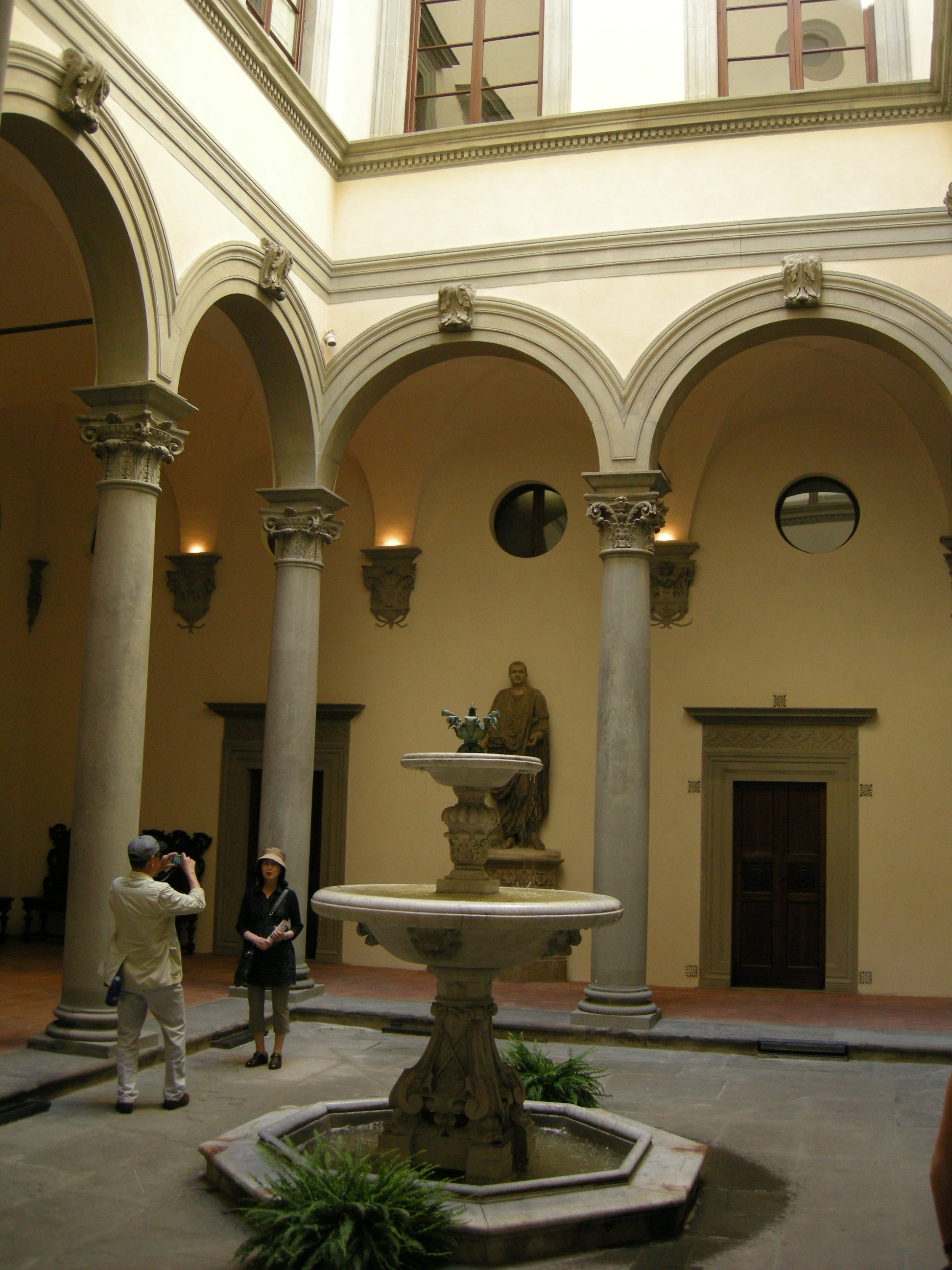 Palazzo gondi, cortile